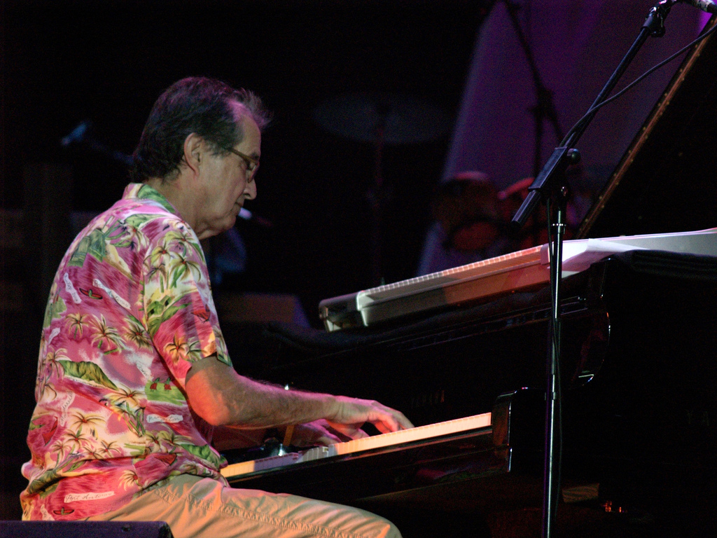 Don Grusin